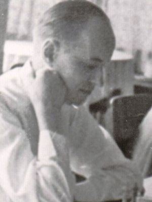 Wolf Dannberg, 1950 in Jena/Saale, Schachkampf Jena gegen Erfurt.